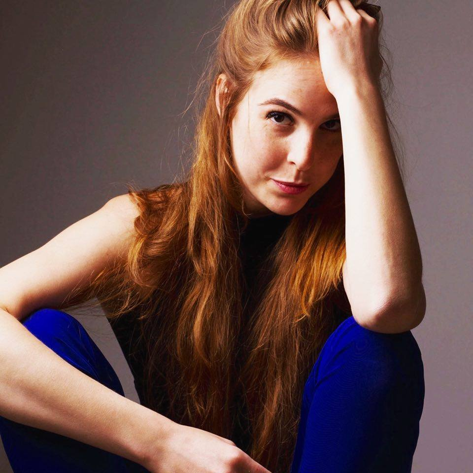 רוני גולדפיין